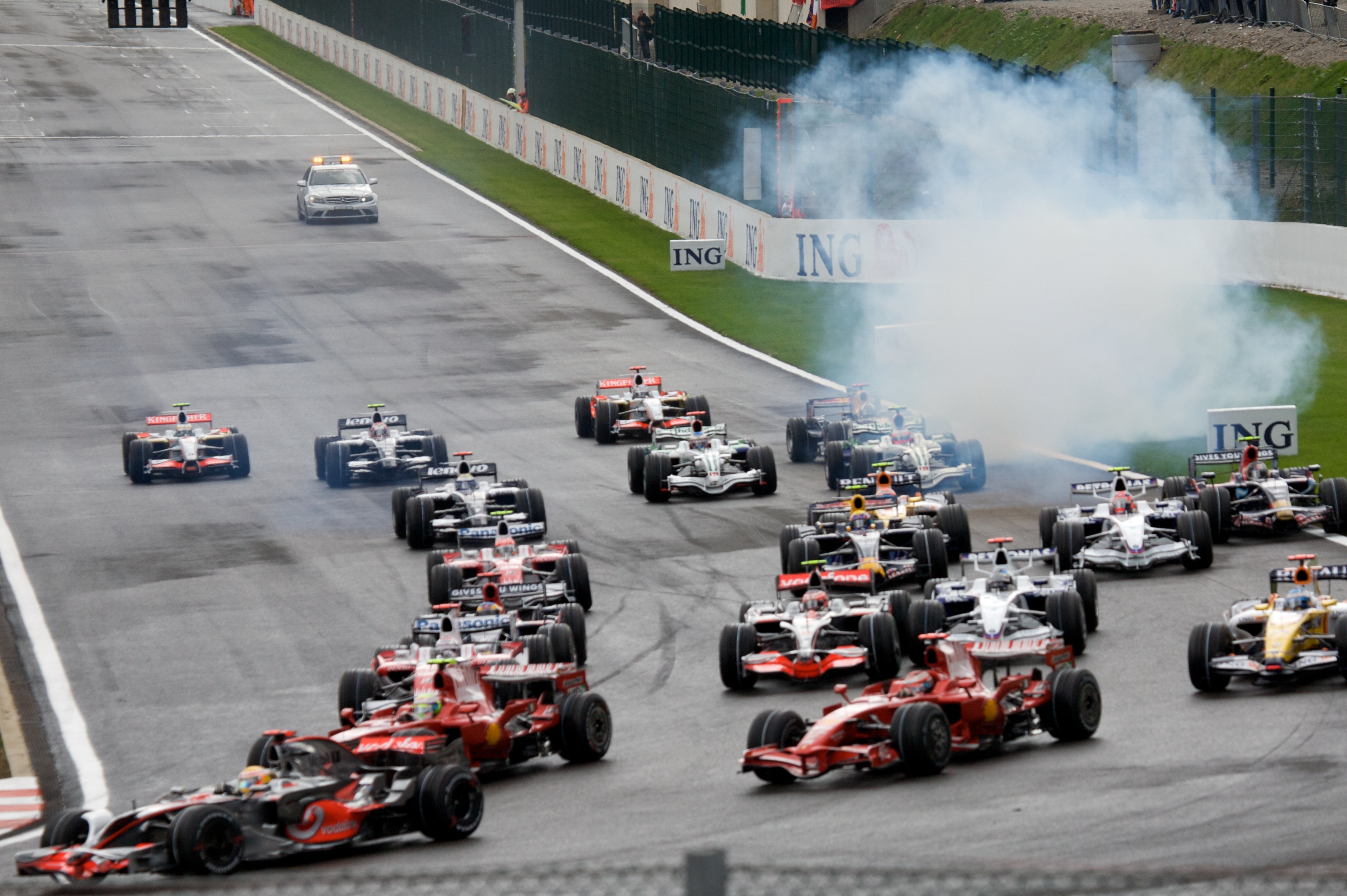 Spa 2008 start smoke